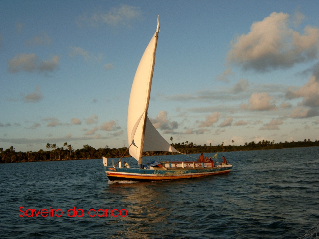 A traditional boat in Bahia (Brazil),autor P.L.Calderoni